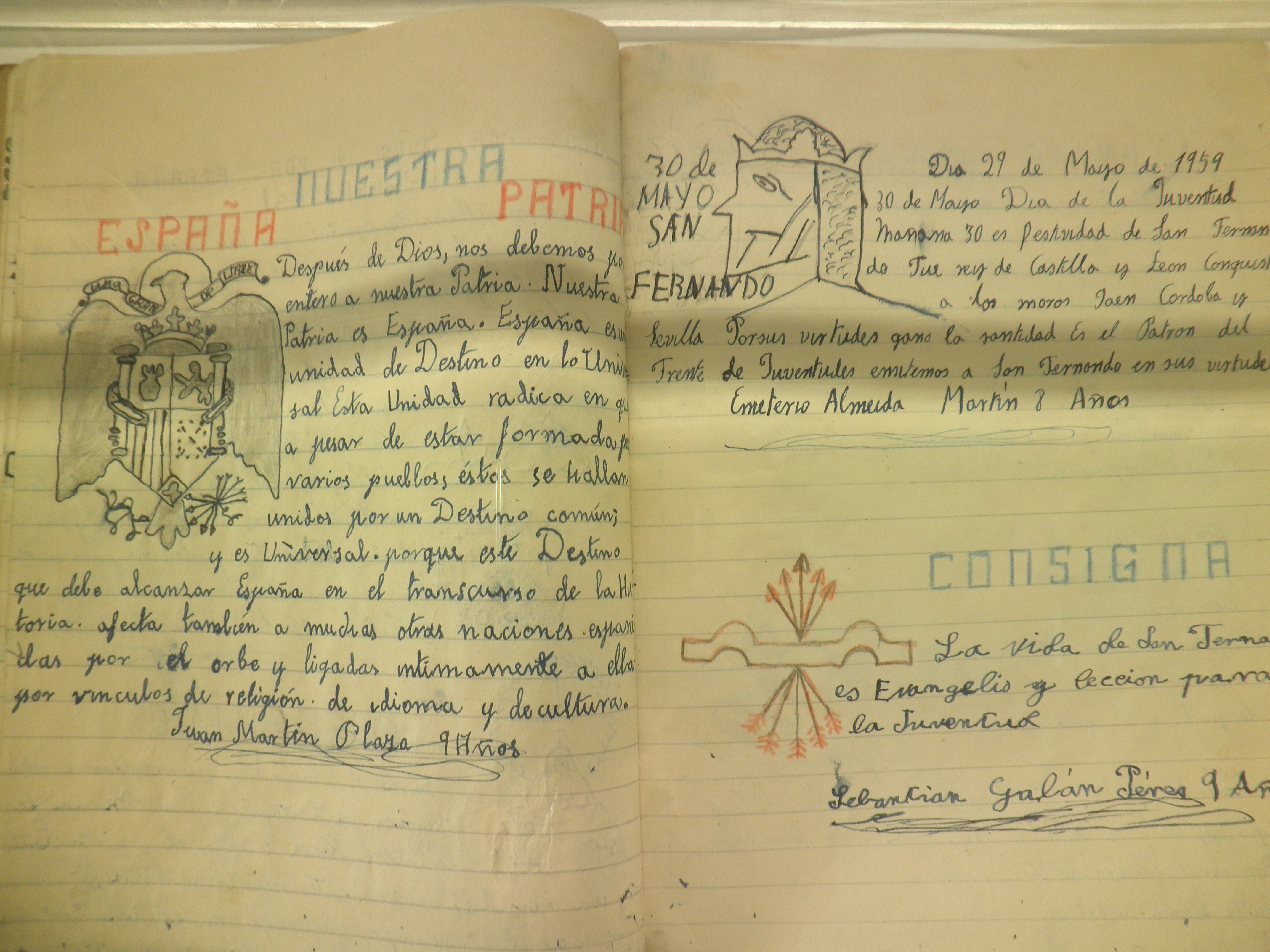 Cuaderno con dictado de la época franquista.